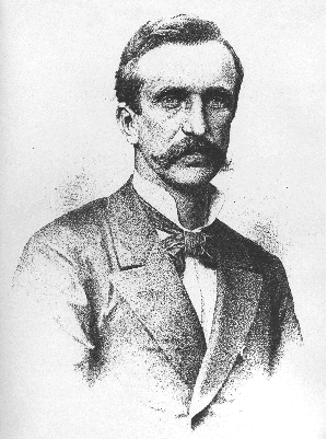 Conrad von Preysing (+ 1903), Reichstagsabgeordneter, Zentrum